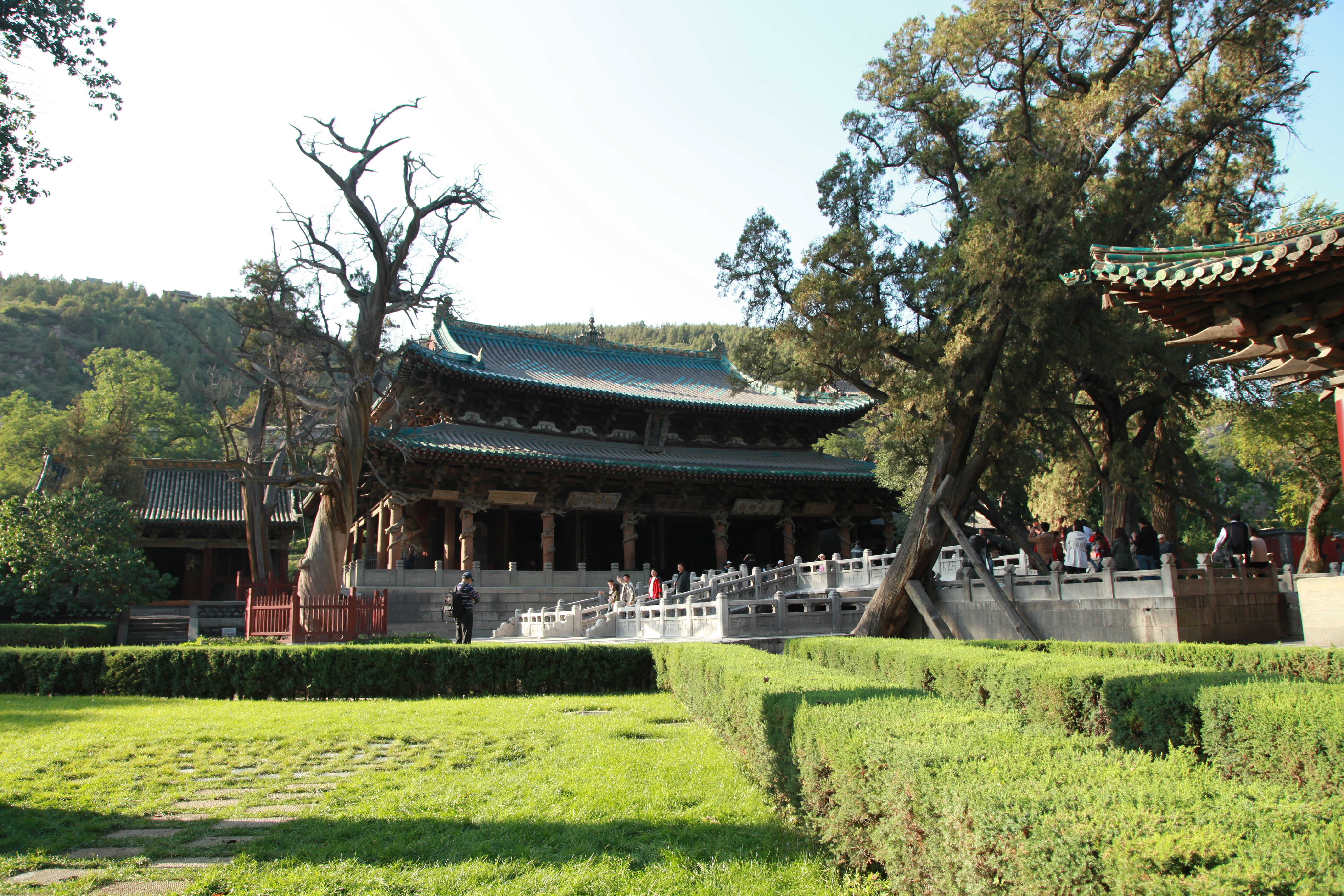 中文（中国大陆）: 晋祠的主体建筑，位于晋祠的中心位置，重要程度可见一斑。